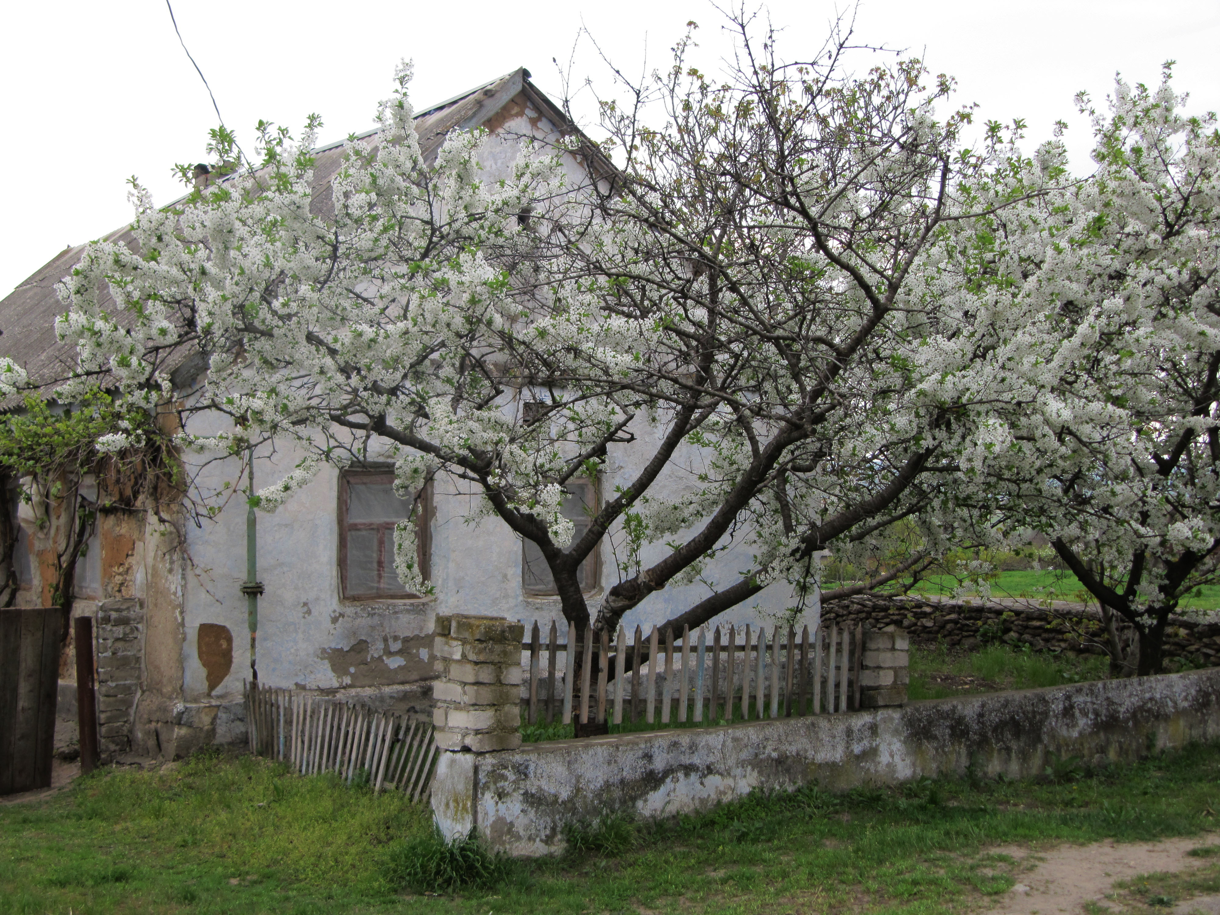 Новоодеський район, село Новопетрівське Миколаївська весна у Вікіпедії